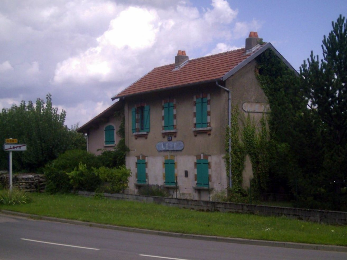 Gare de l'ancienne ligne Pompey - Nomeny à Leyr